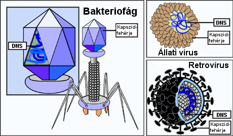 Vírusfajták